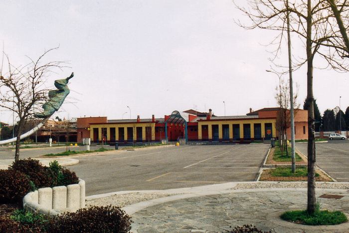 La piazza del mercato di Origgio e la palazzina polifunzionale sede della Posta e delle associazioni del paese